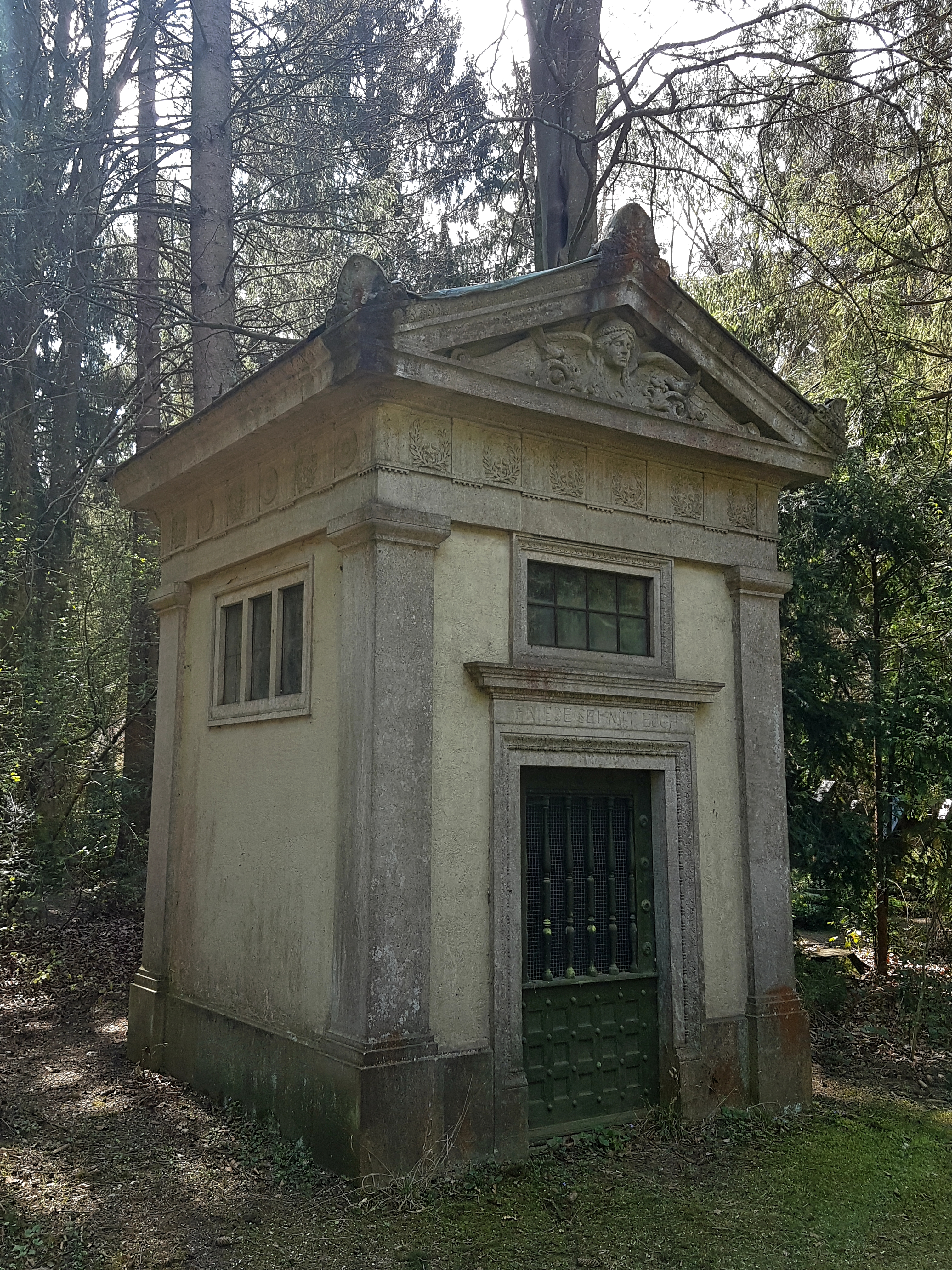 Waldfriedhof (München), Grabkapelle der Familie Anton von Wehner († 1915)